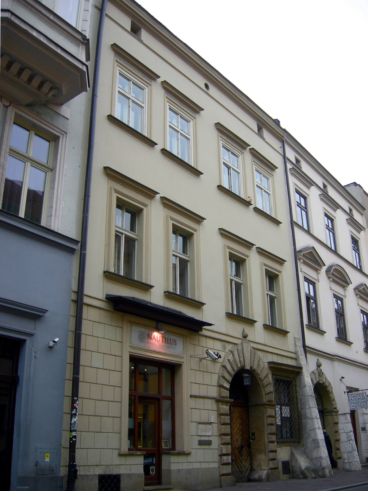 Dom przy ul. Świętego Jana 12 w Krakowie.